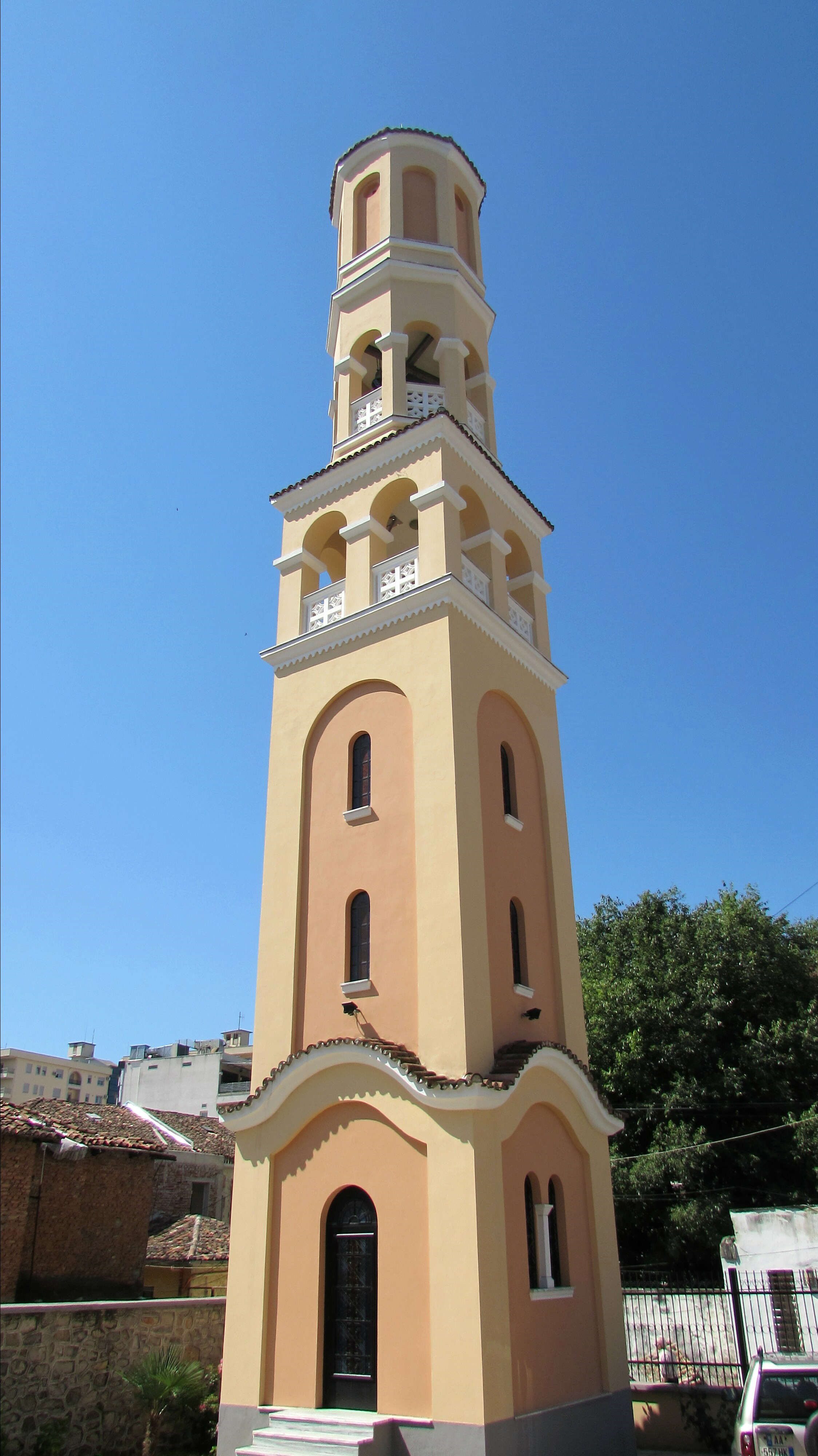 ShkodraOrthodoxeKathedraleChristiGeburt-2